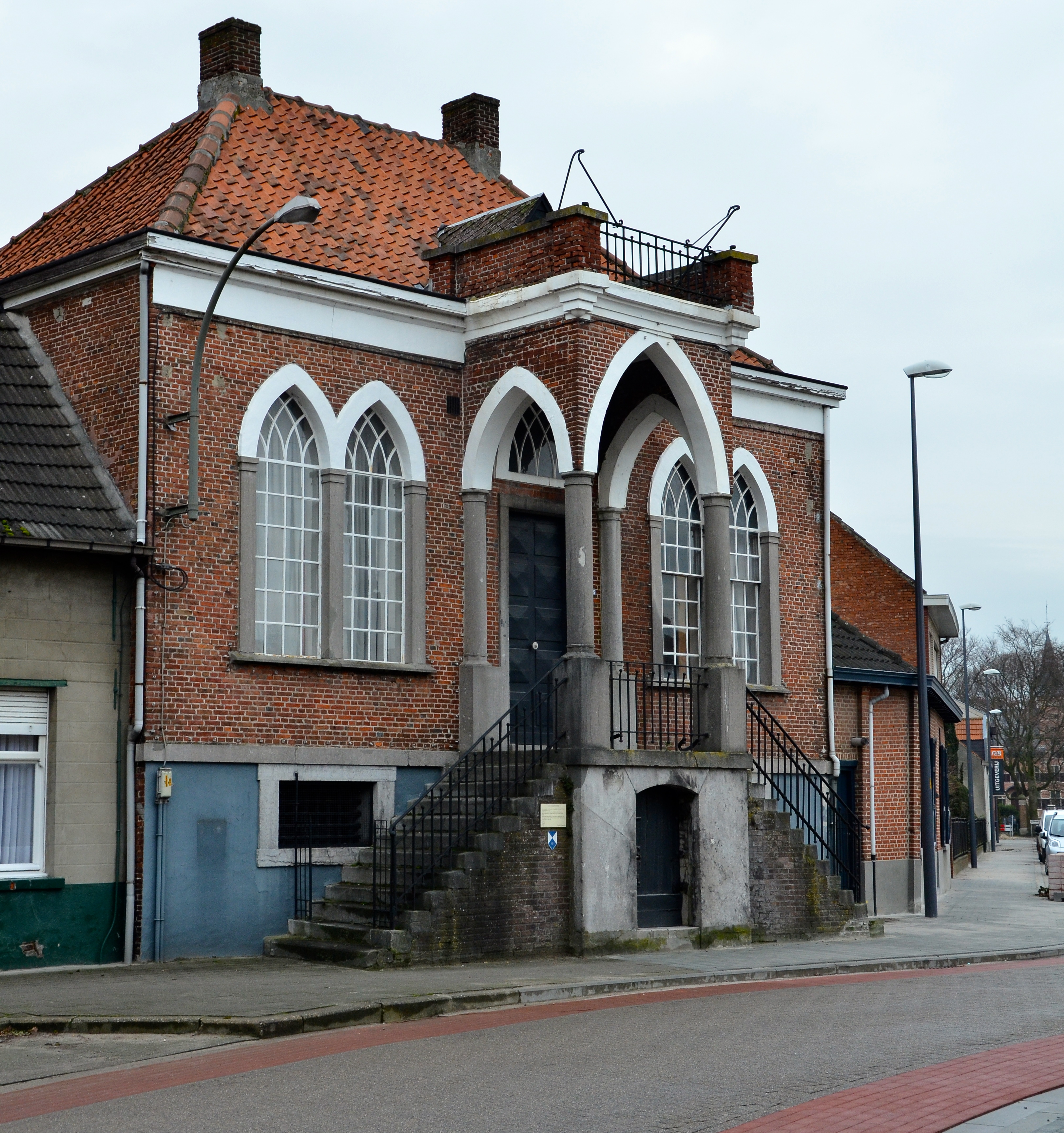 Oude Gemeentehuis Wuustwezel, Dorpsstraat 105